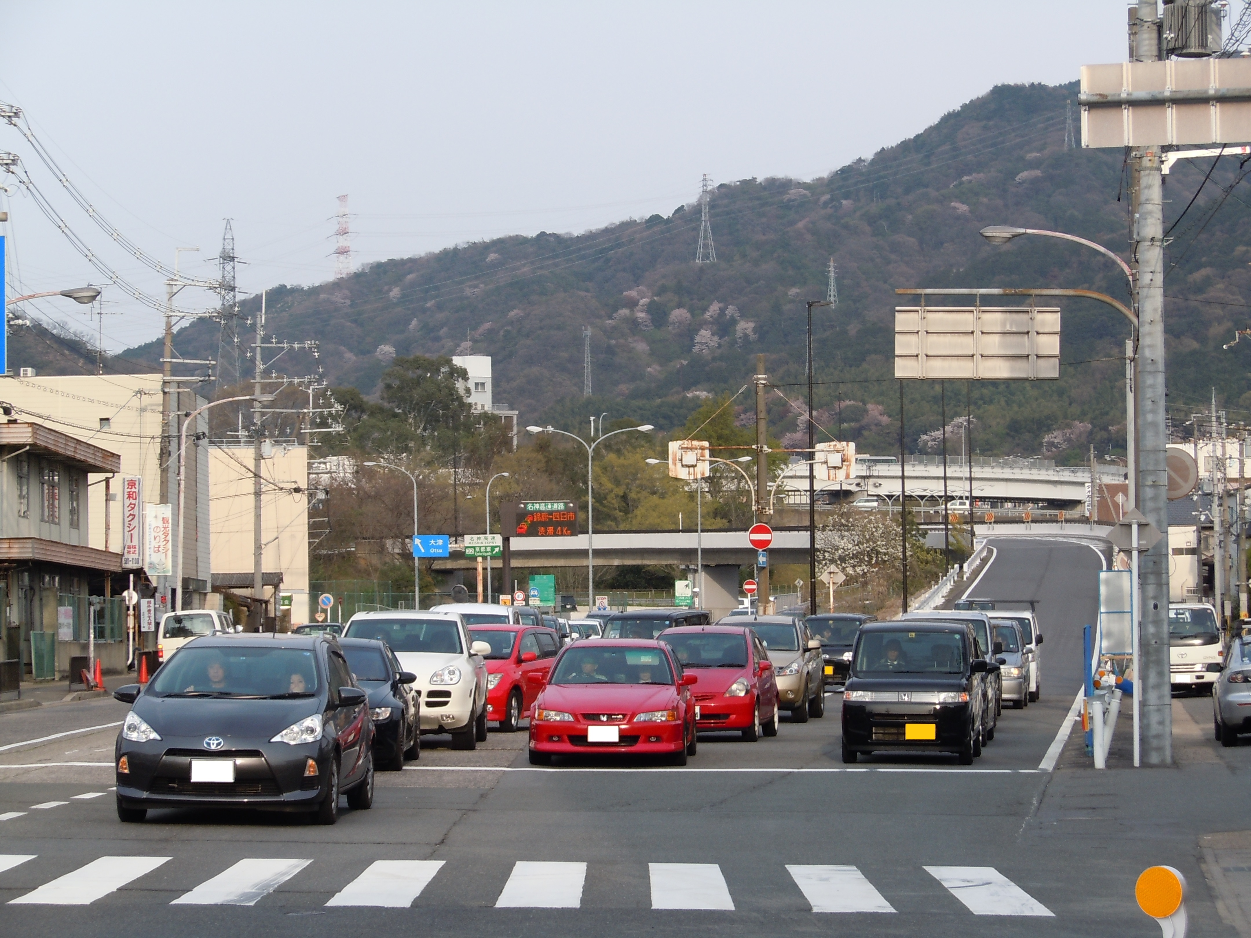 四宮交差点から名神高速京都東出入口付近を撮影した結果、このようになりました。